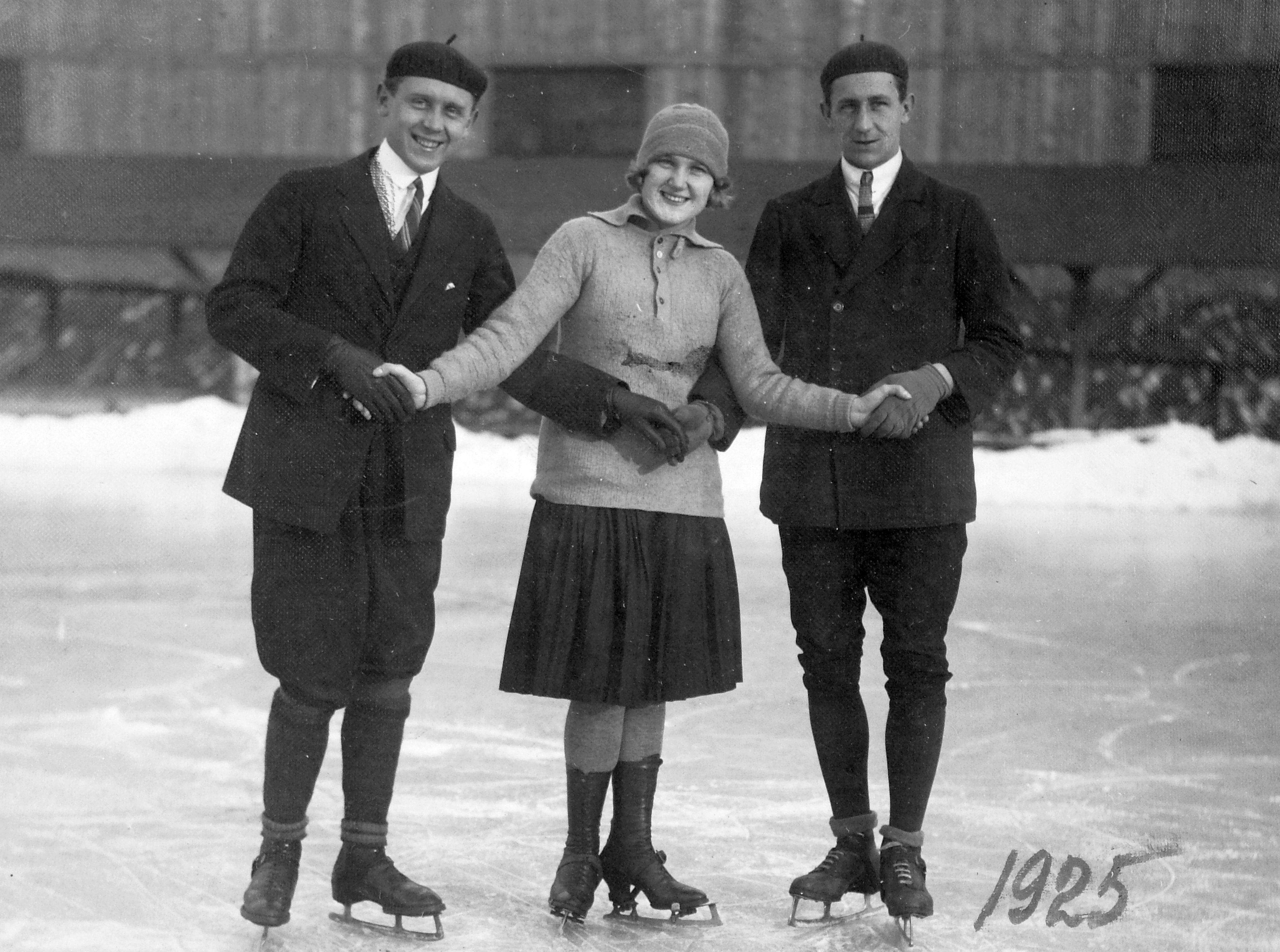 Tags: skating, man, woman, ice-skating rink, winter, smile, free time